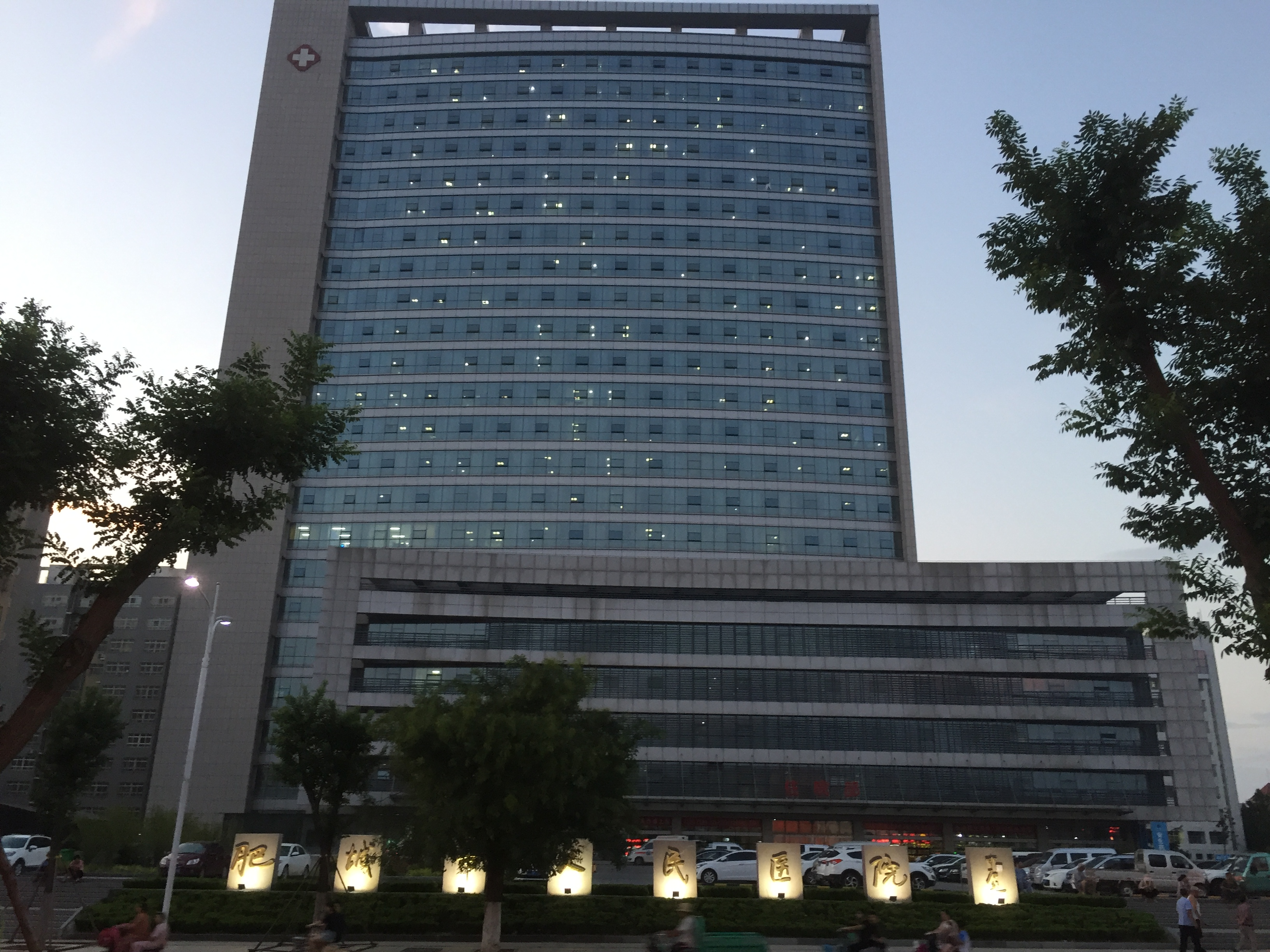 中文（中国大陆）: 肥城市照片